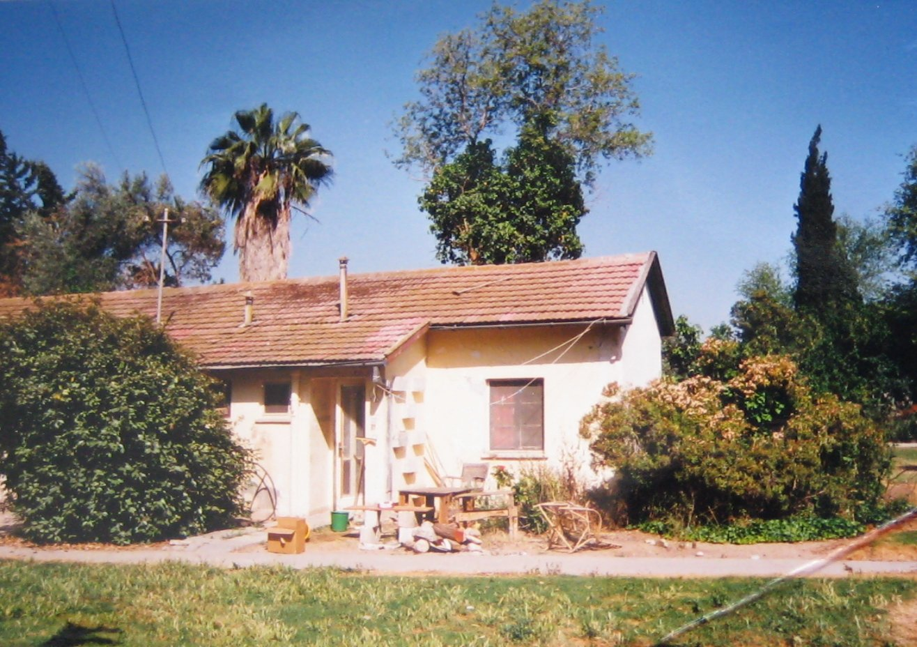 Een volunteers huisje in Nahal Oz